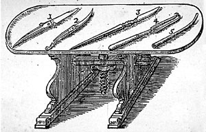 Une table rotative dans un théâtre anatomique. Michaelis Lyseri, Culter anatomicus, Copenhague, 1665.